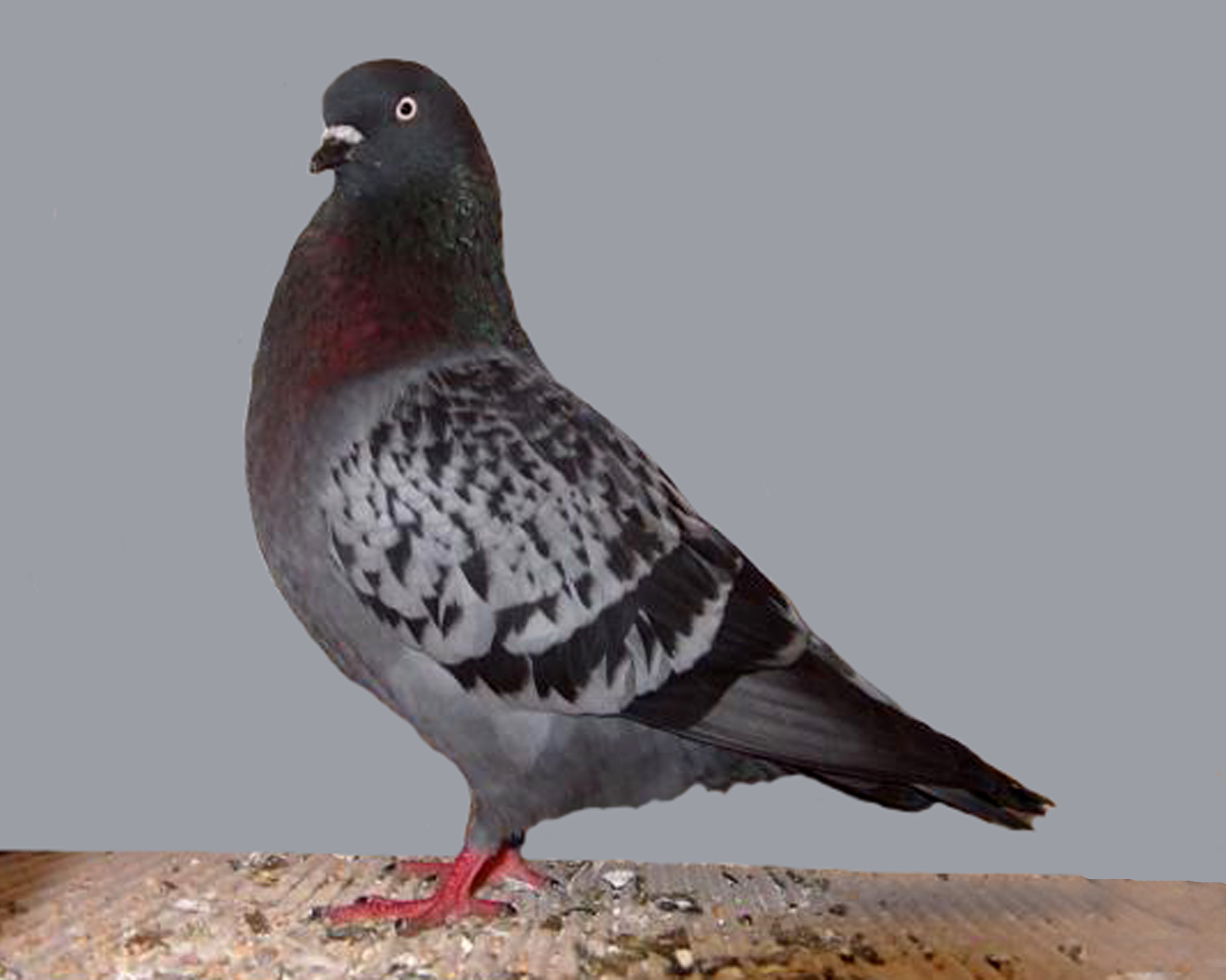 Cologne Tumbler (Blue Checquer)